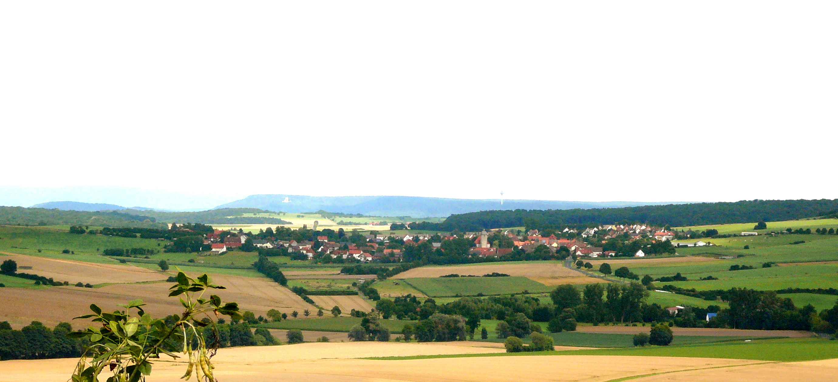 Blick vom Hang des Backenberges nach Nordnordwesten auf Barterode, Gemeinde Adelebsen, Niedersachsen.